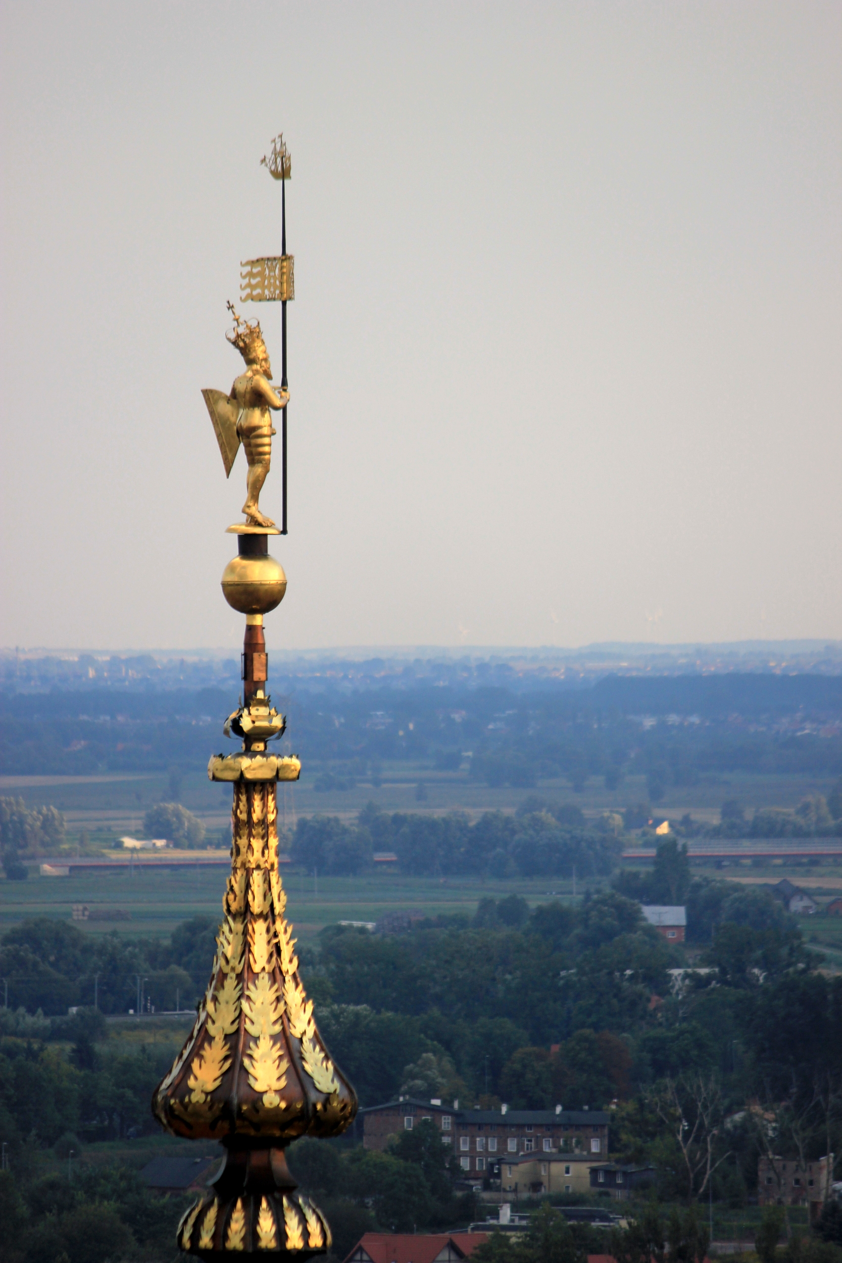 Wetterfahne des Rechtstädtischen Rathauses in Danzig.